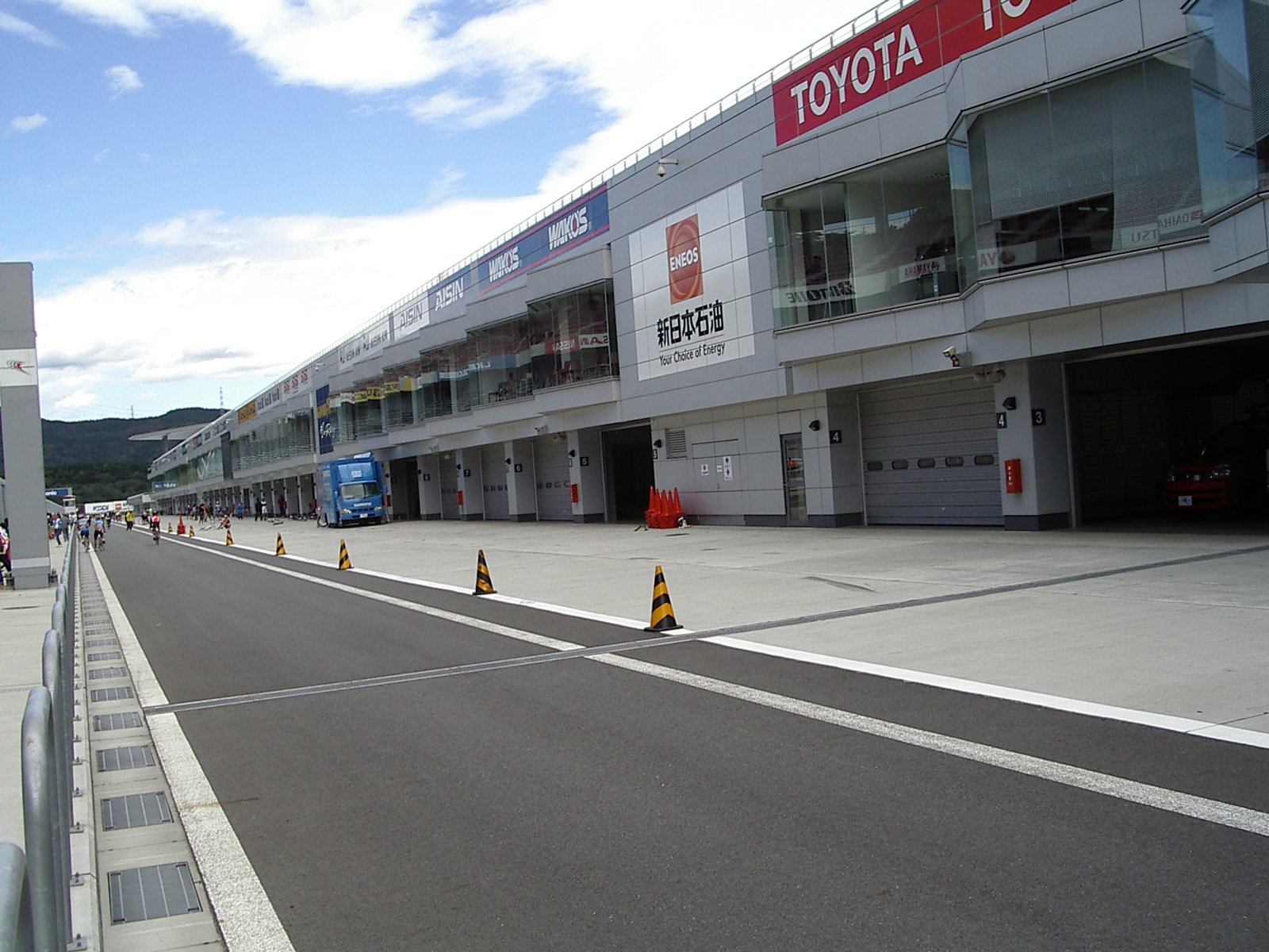 Fuji Speedway Pit lane The picture was taken by myself at "2006 cycling festival in Oyama" in October 7, 2006 富士スピードウェイのピットレーン。2006年10月7日に行なわれた「2006 サイクリングフェスティバル イン 小山」で撮影。